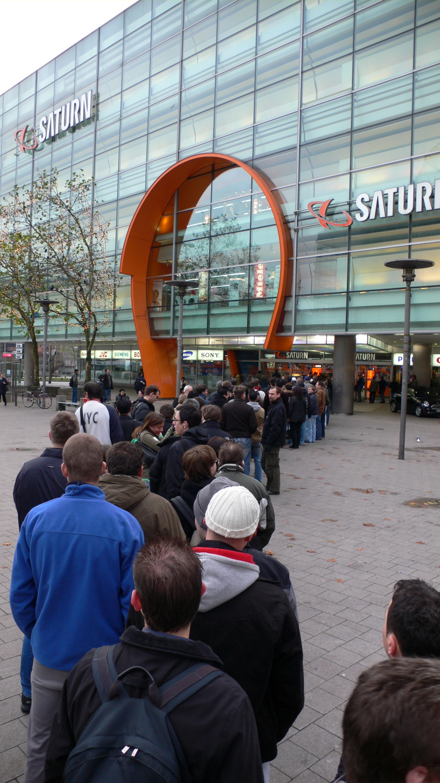 Wii Launch Hamburg - Vor Saturn